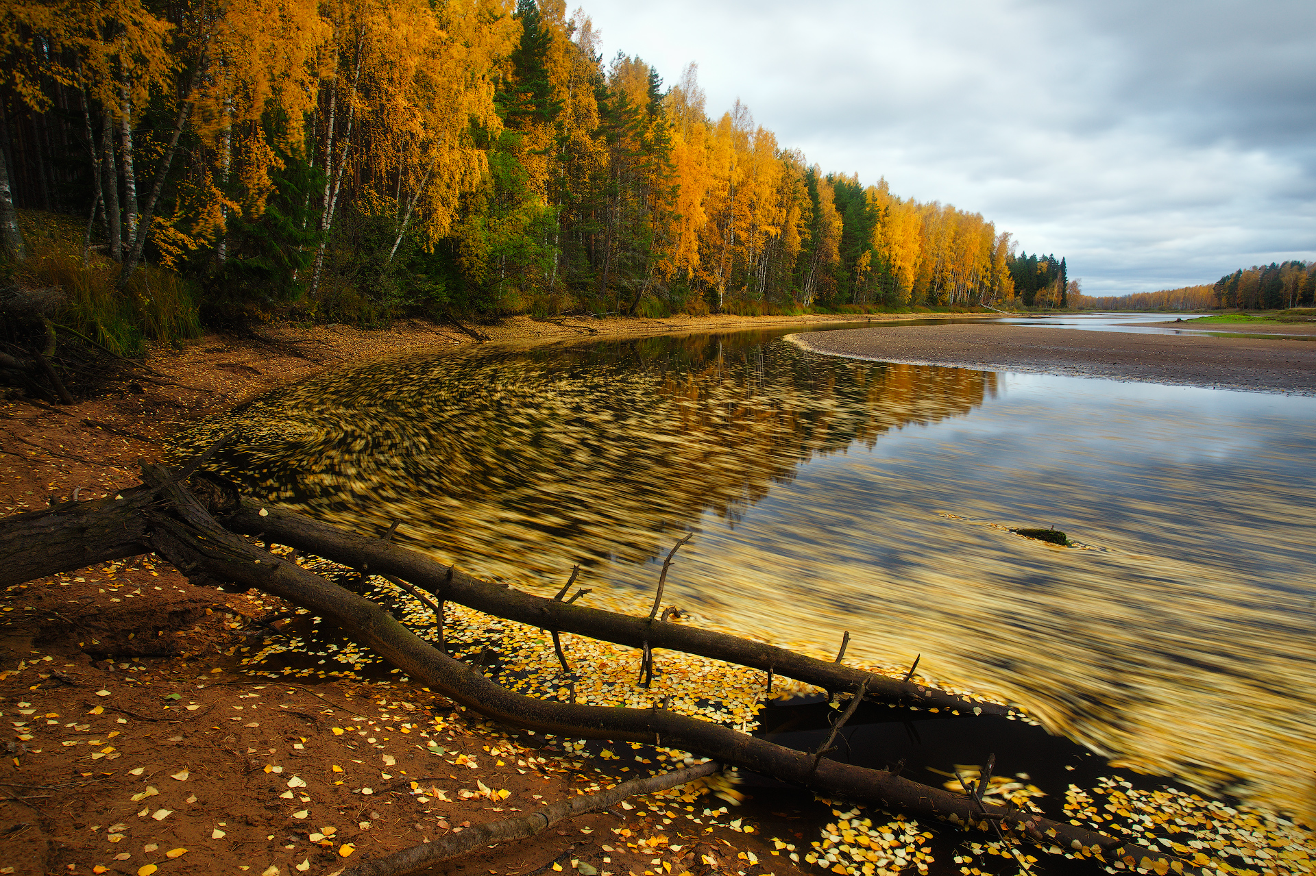 река Лоша, Дарвинский заповедник, Череповецкий район This image is related to the protected area of Russia number 3500223